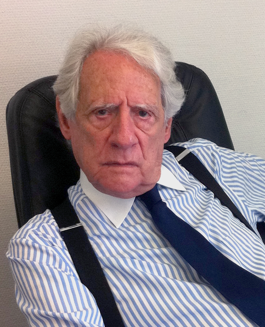 Arq. Rafael Calventi en su despacho.